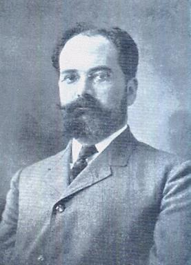 Dr. Eduino Rocha, médico cirurgião e empresário português nascido na ilha do Faial.